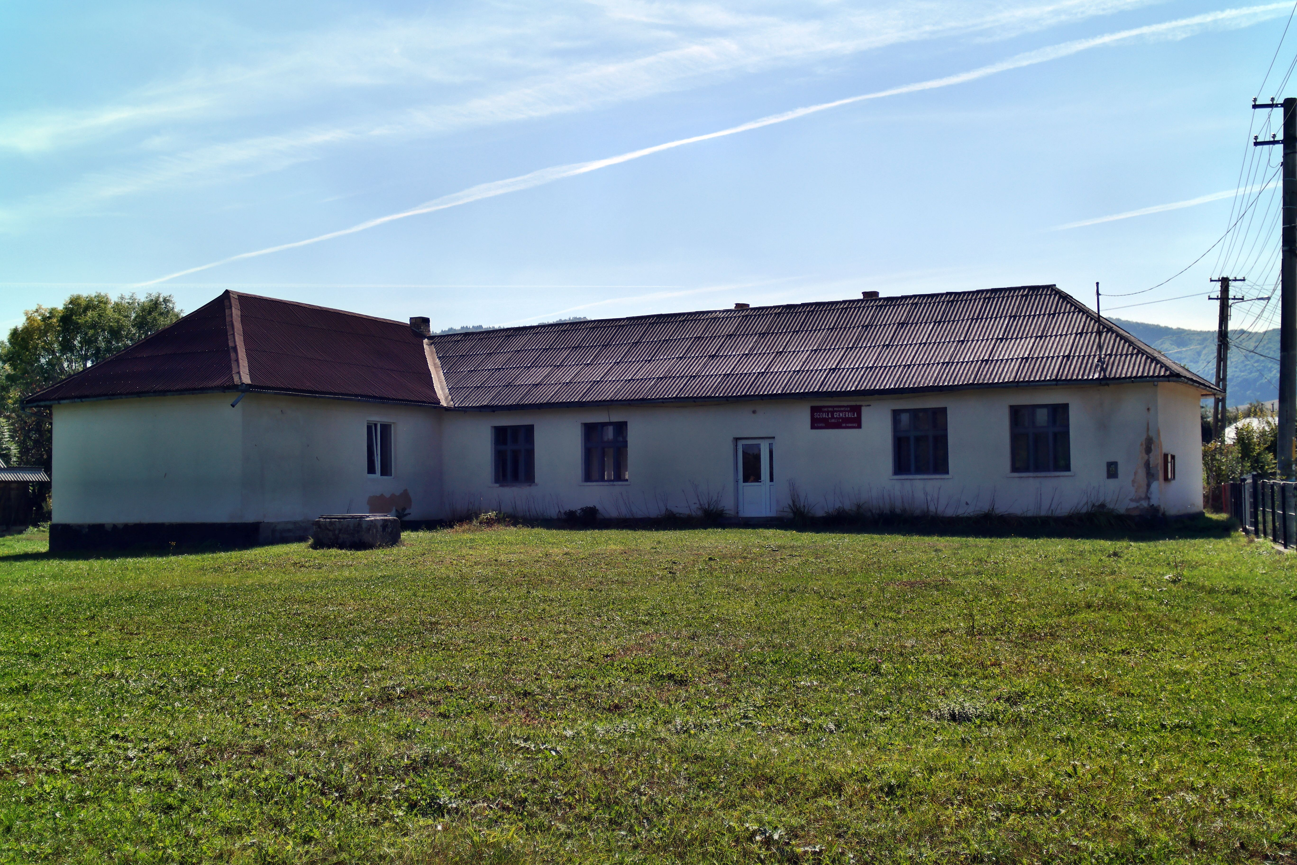 Școala nouă din satul Peteritea, Județul Maramureș.